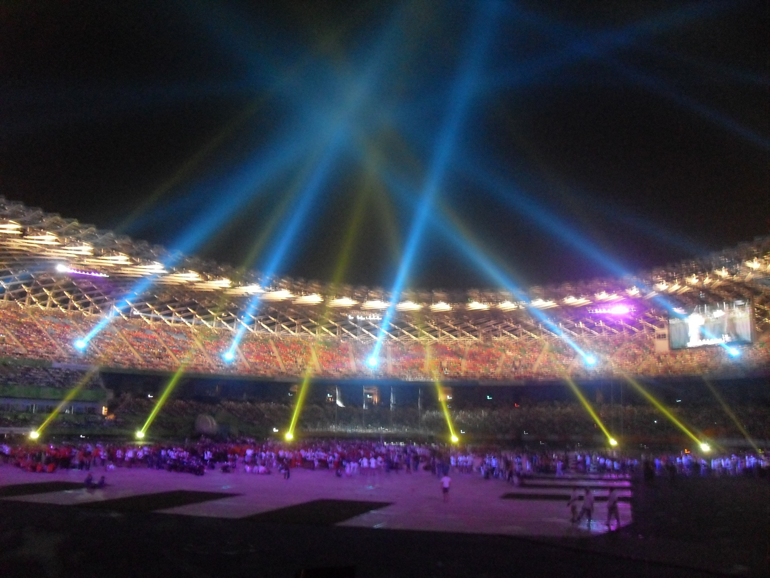 Kaohsiung World Games Opening Ceremony